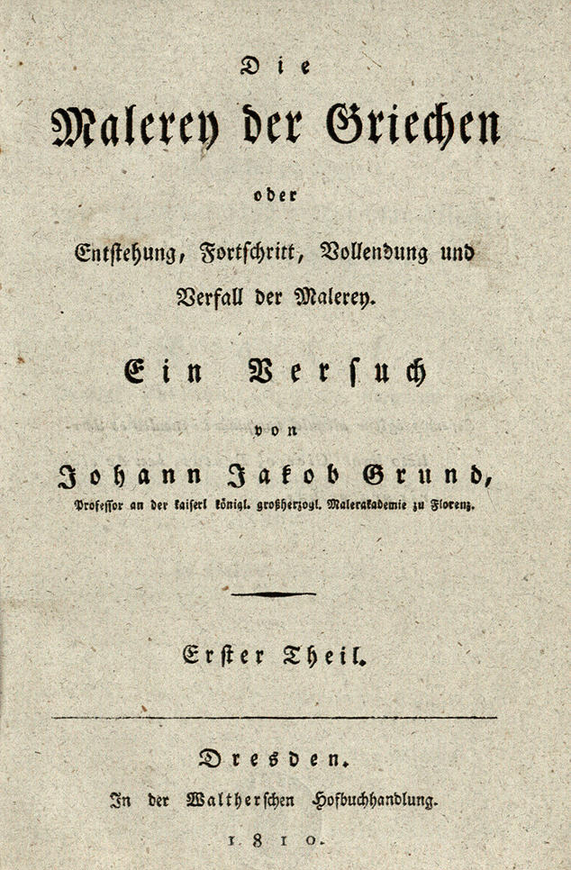 Die Malerey der Griechen Erster Theil